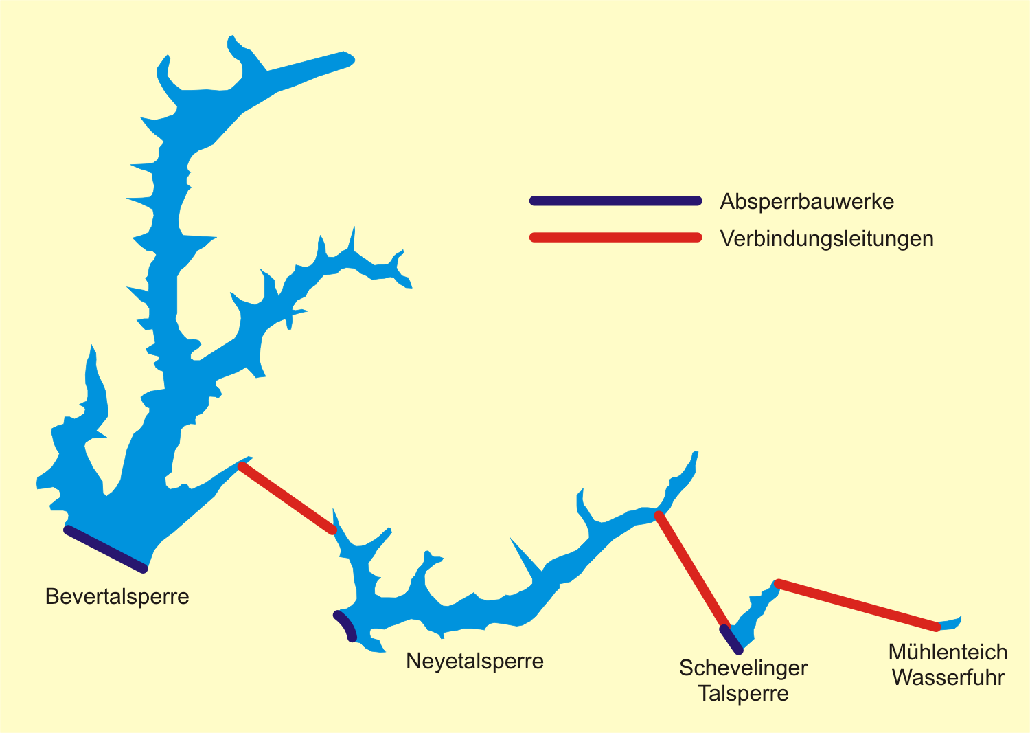 Lage des Beverblocks mit den Verbindungsleitungen